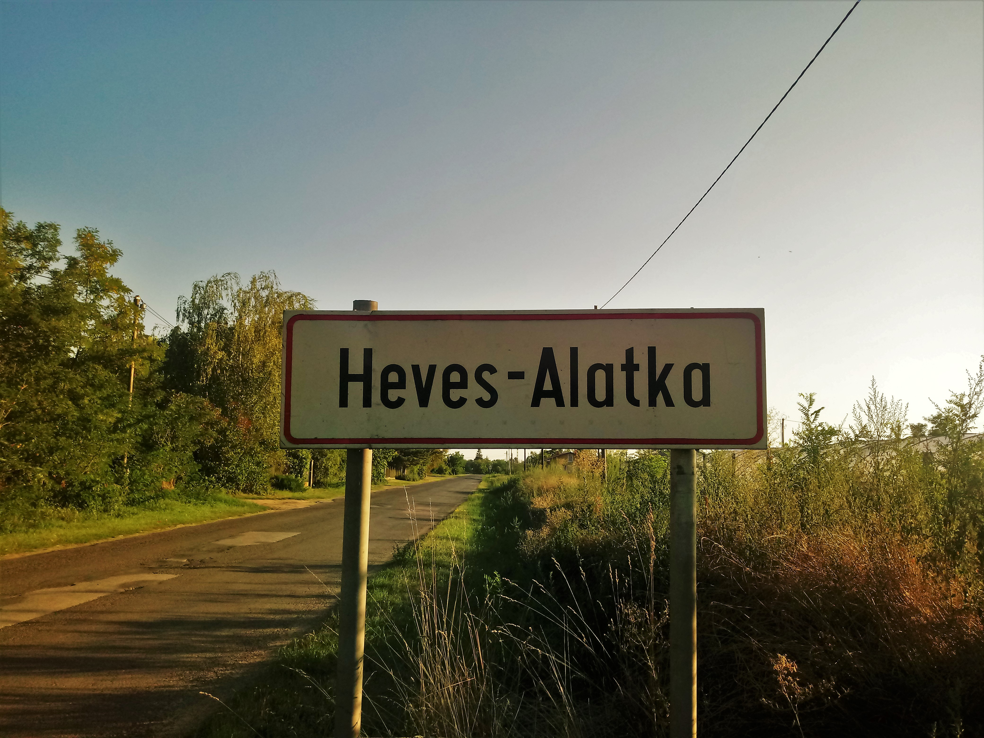 Alatka névtábla